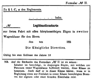 Muster eines Freifahrscheins aus der Anlage zum Erlaß des preußischen Handelsminister vom 16. Januar 1854 "Reglement, die freien Fahrten auf der Eisenbahn betreffend".